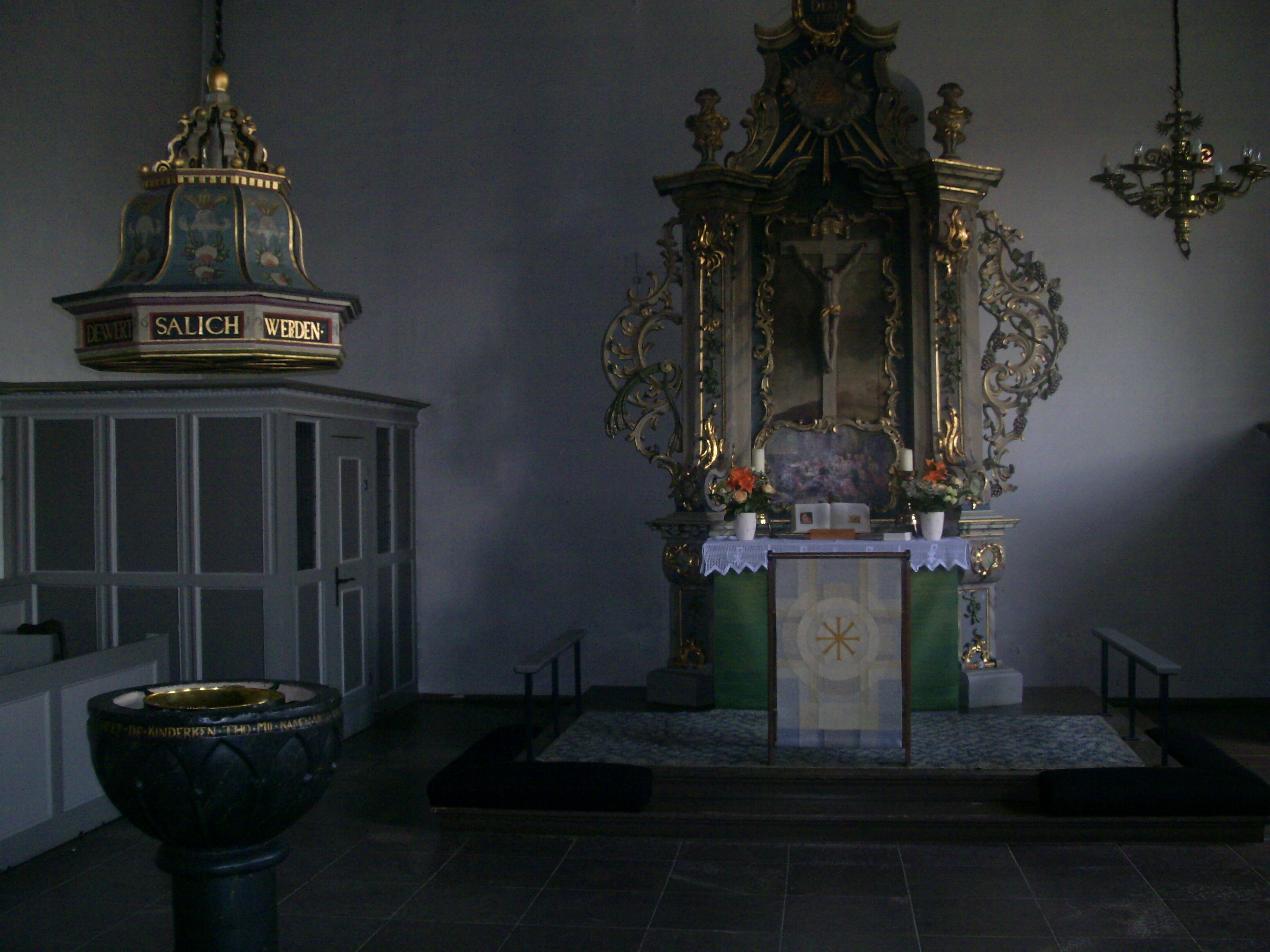 Evangelischer Kirchenaltar in Flensburg-Adelby